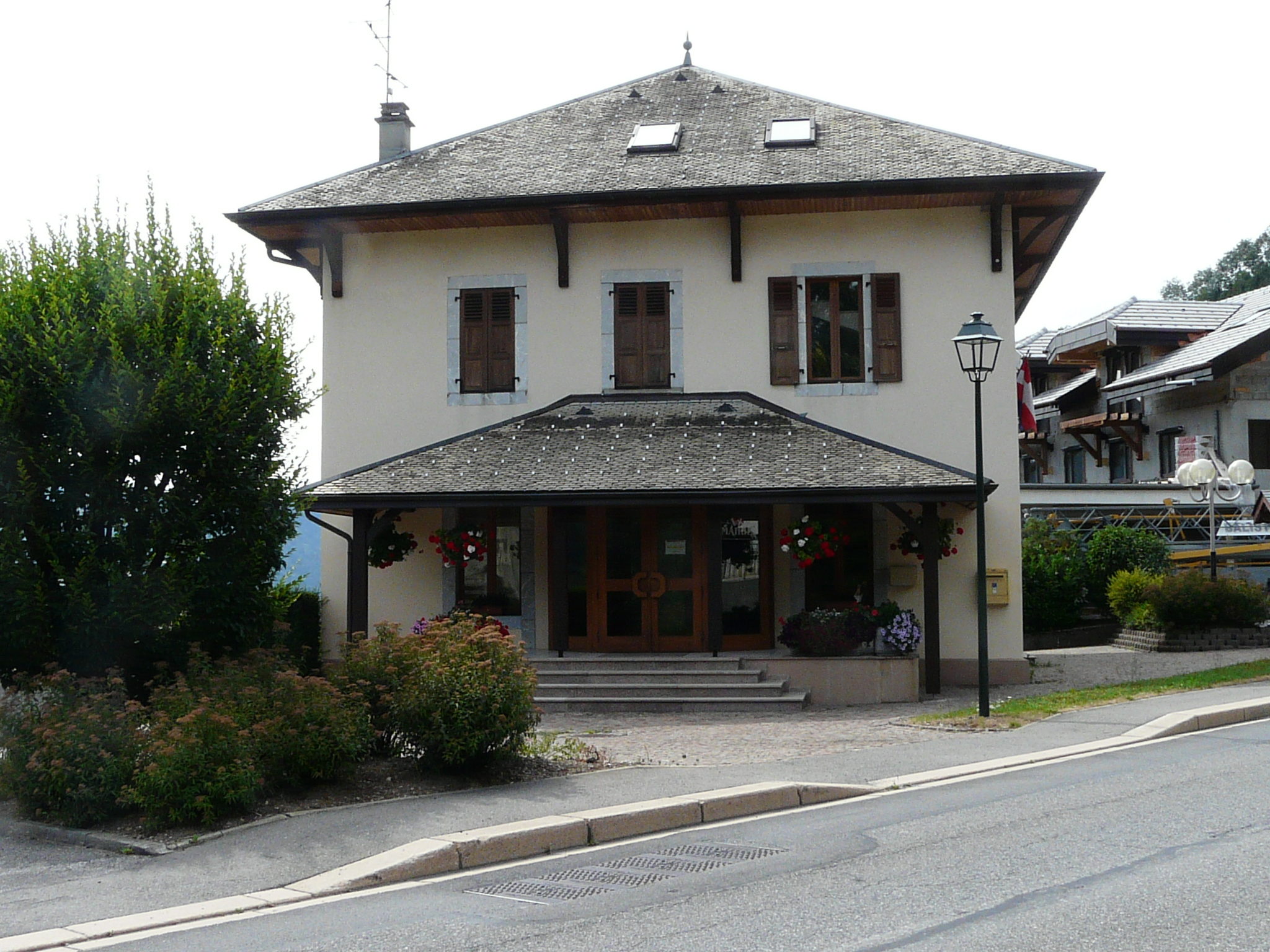 Chevenoz (Haute-Savoie, France) : la mairie